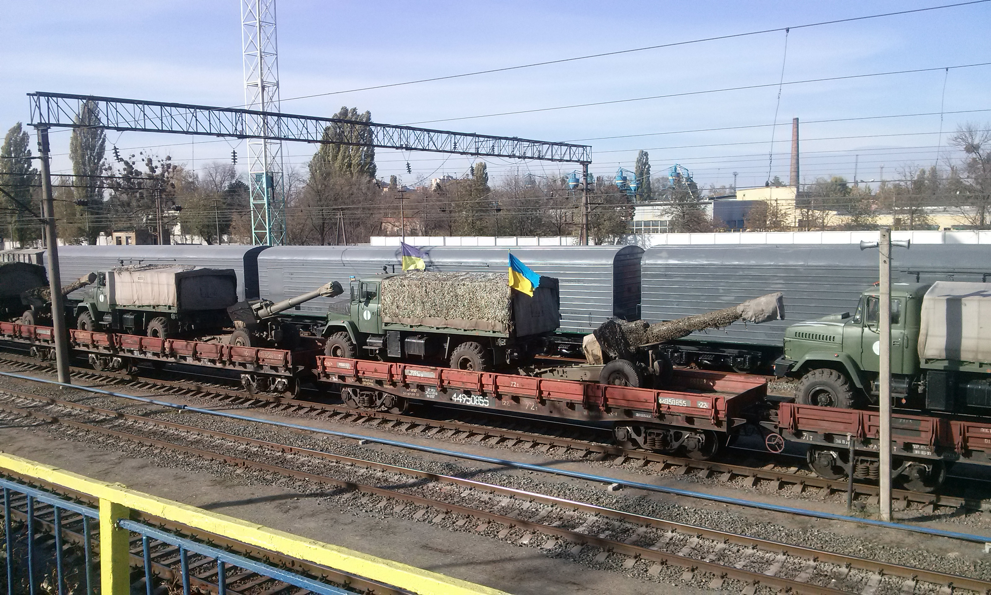 Часть воинского поезда ВСУ.